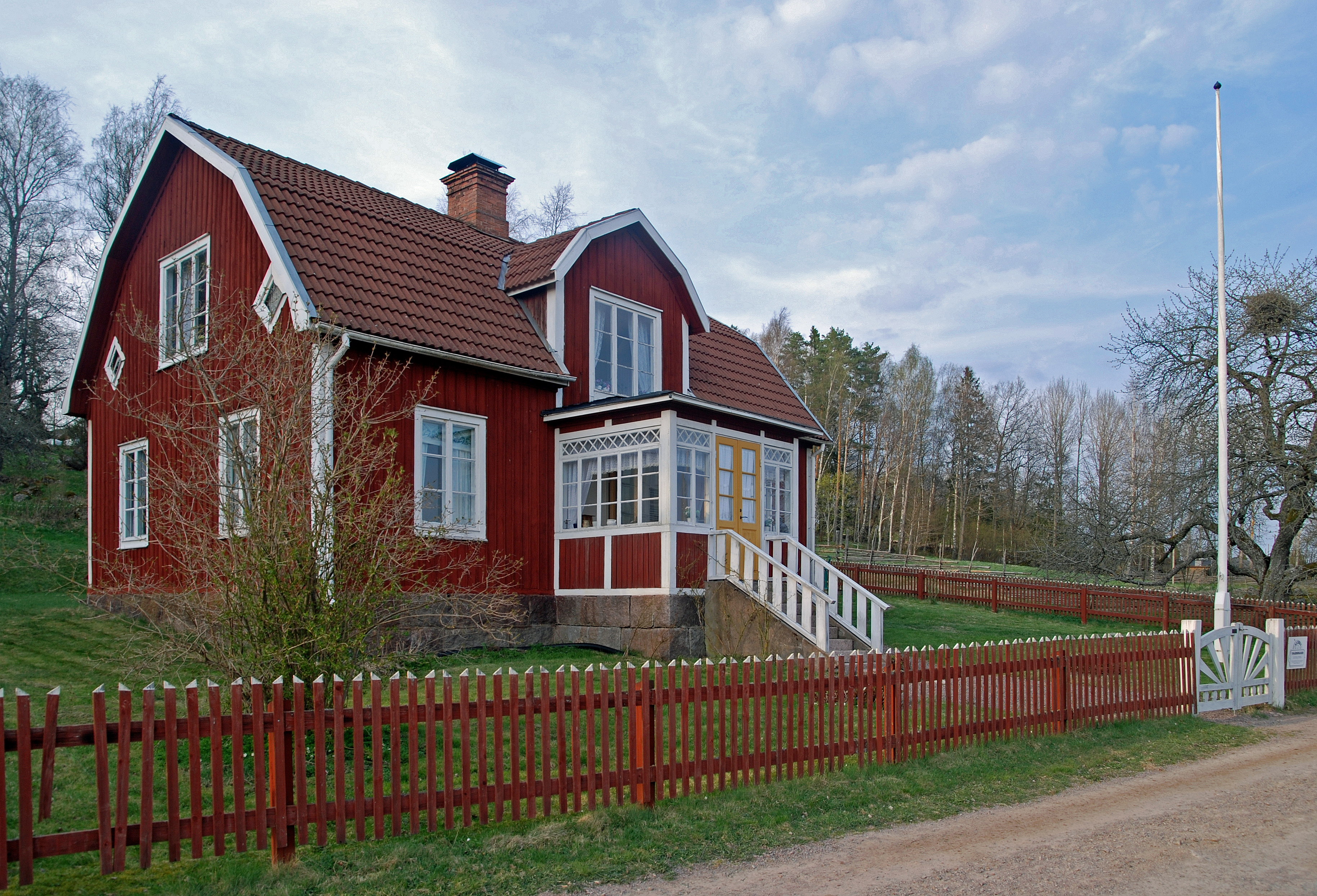 Michel aus Lönneberga, fiktives Haus, in dem die Verfilmungen spielen